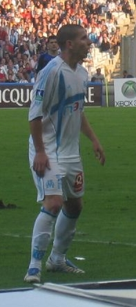 Sergio Contreras Pardo dit Koke sous les couleurs de l'Olympique de Marseille lors du match OM-Lille du 29 octobre 2005